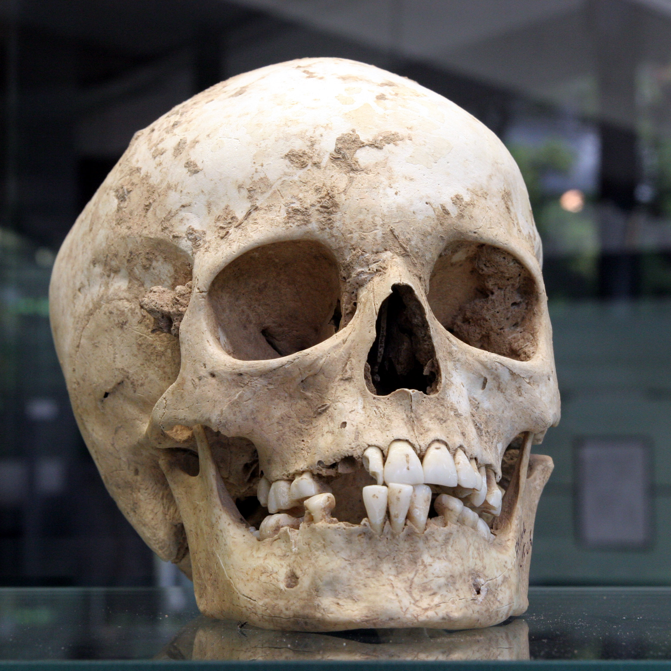 Schädel aus der Jungsteinzeit (5000 v. Chr.), aus dem Fund in Herxheim bei Landau/Pfalz. Der Schädel befindet sich im Museum des Institutes für Geowissenschaften an der Ruprecht-Karls-Universität in Heidelberg (Im Neuenheimer Feld 234) [1]